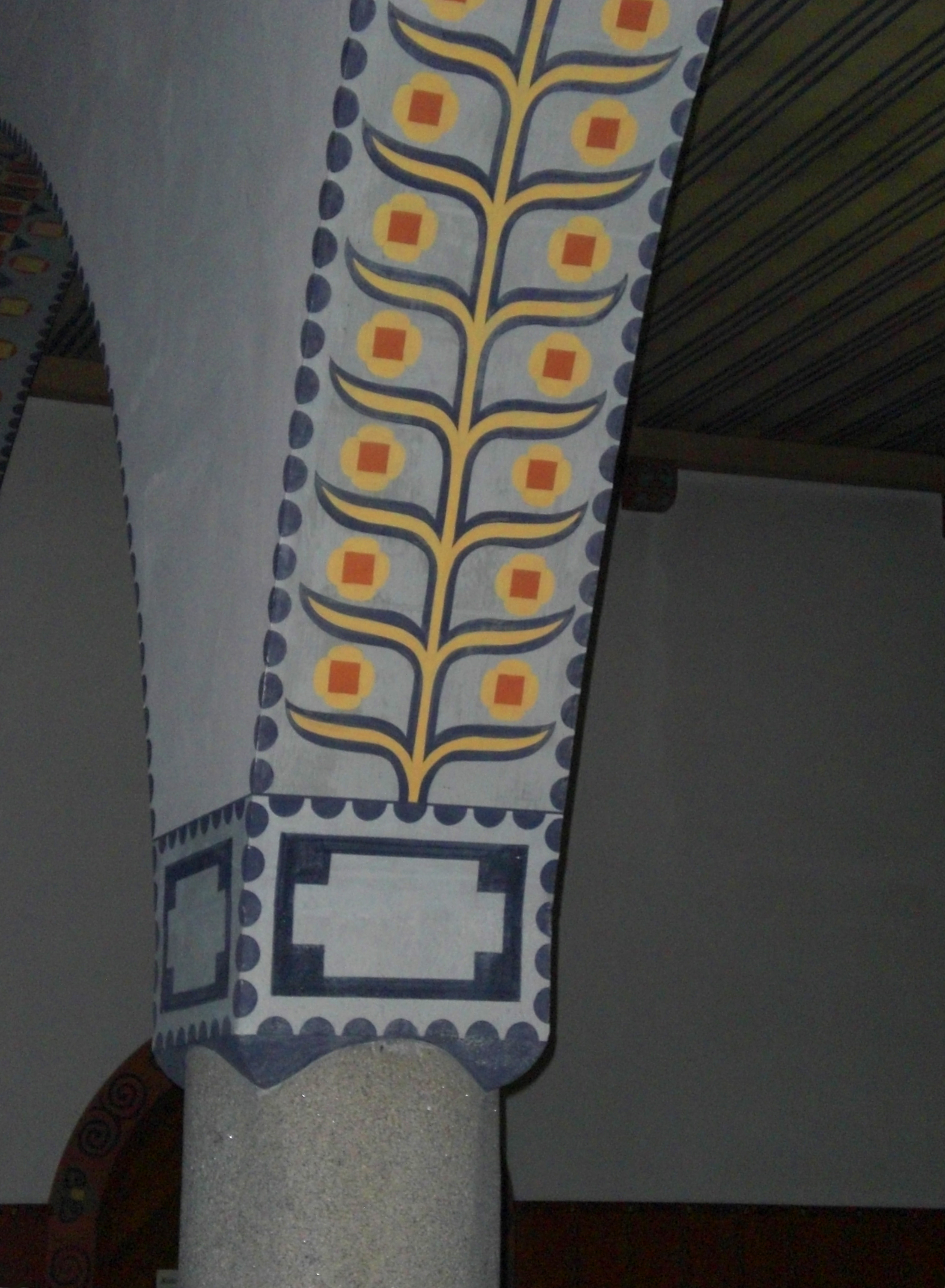 Malerei an einer Säule in der Klinkkirche Homburg